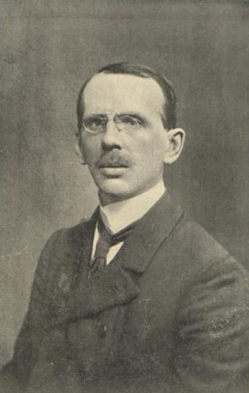 Ignacy Tadeusz Baranowski - polski historyk